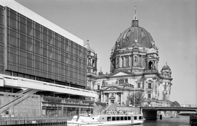 22.7.1991 Berlin-Mitte, Berliner Dom